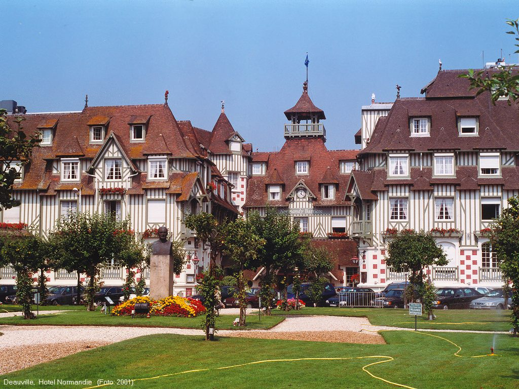 Hotel Normandy, Deauville, Frankreich, Foto 2001